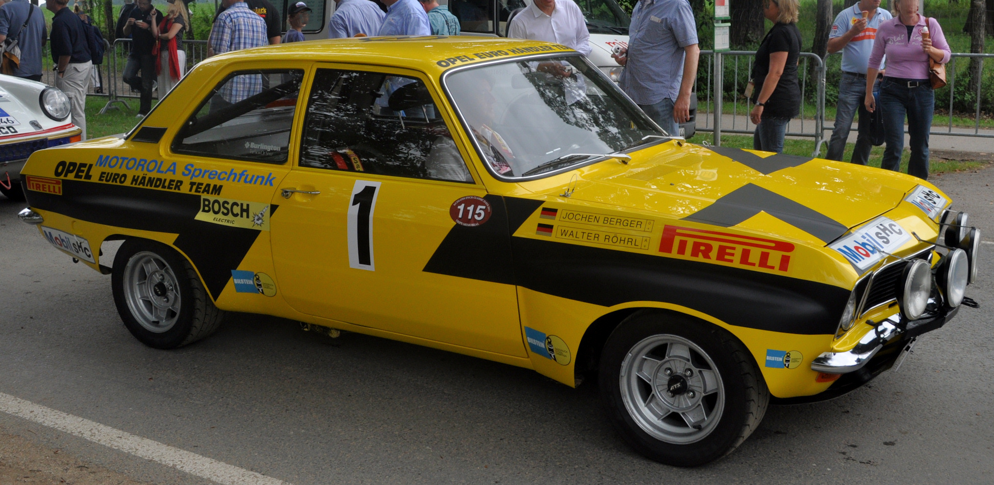 Opel Ascona A Rallye Gruppe 2 (Walter Röhrl, 1974) während der Classic days 2011 auf Schloss Dyck